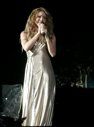 Shakira durante el ultimo show de su tour El Dorado World Tour en Bogotá Colombia